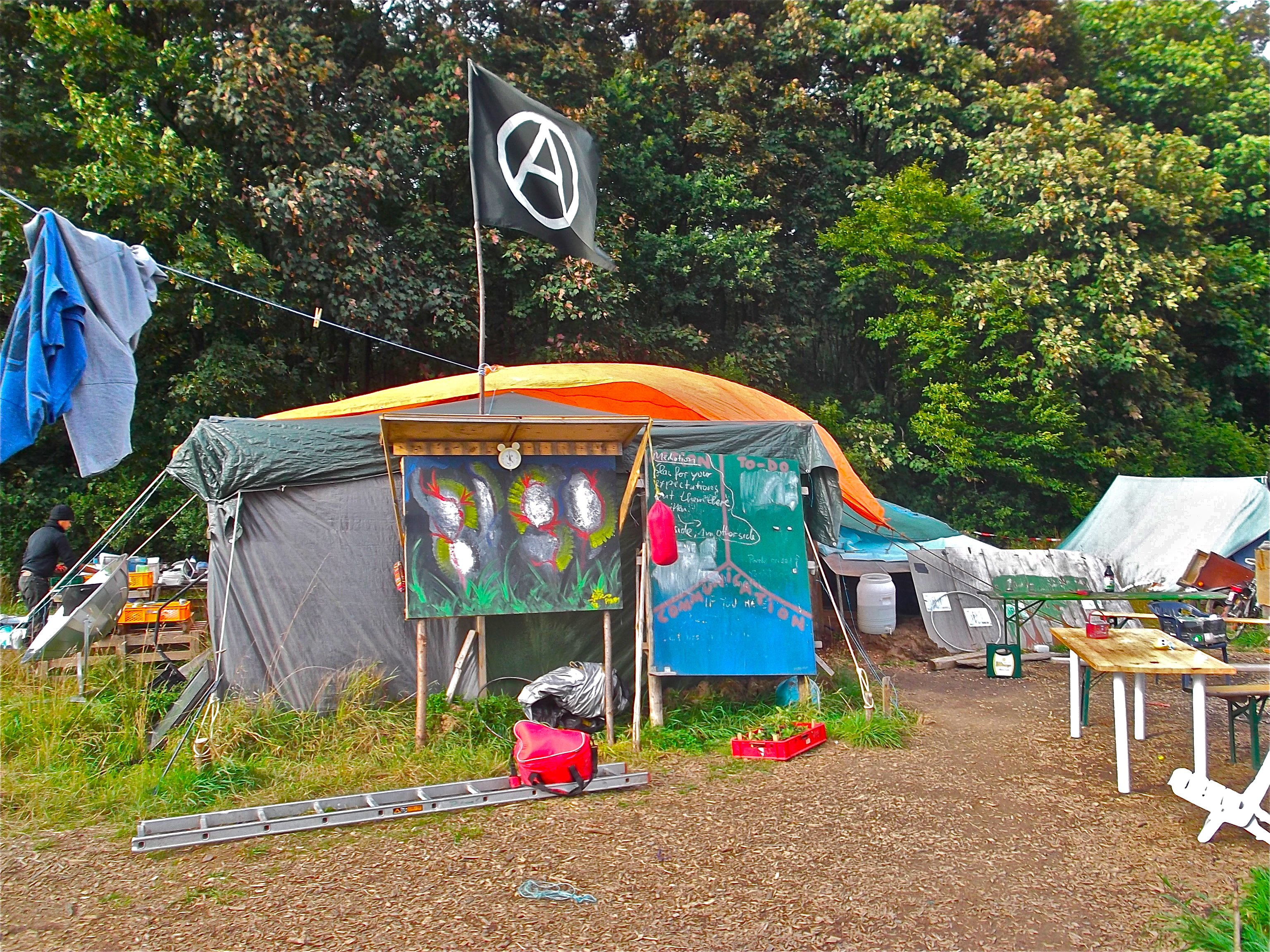 Protestcamp Hambacher Forst